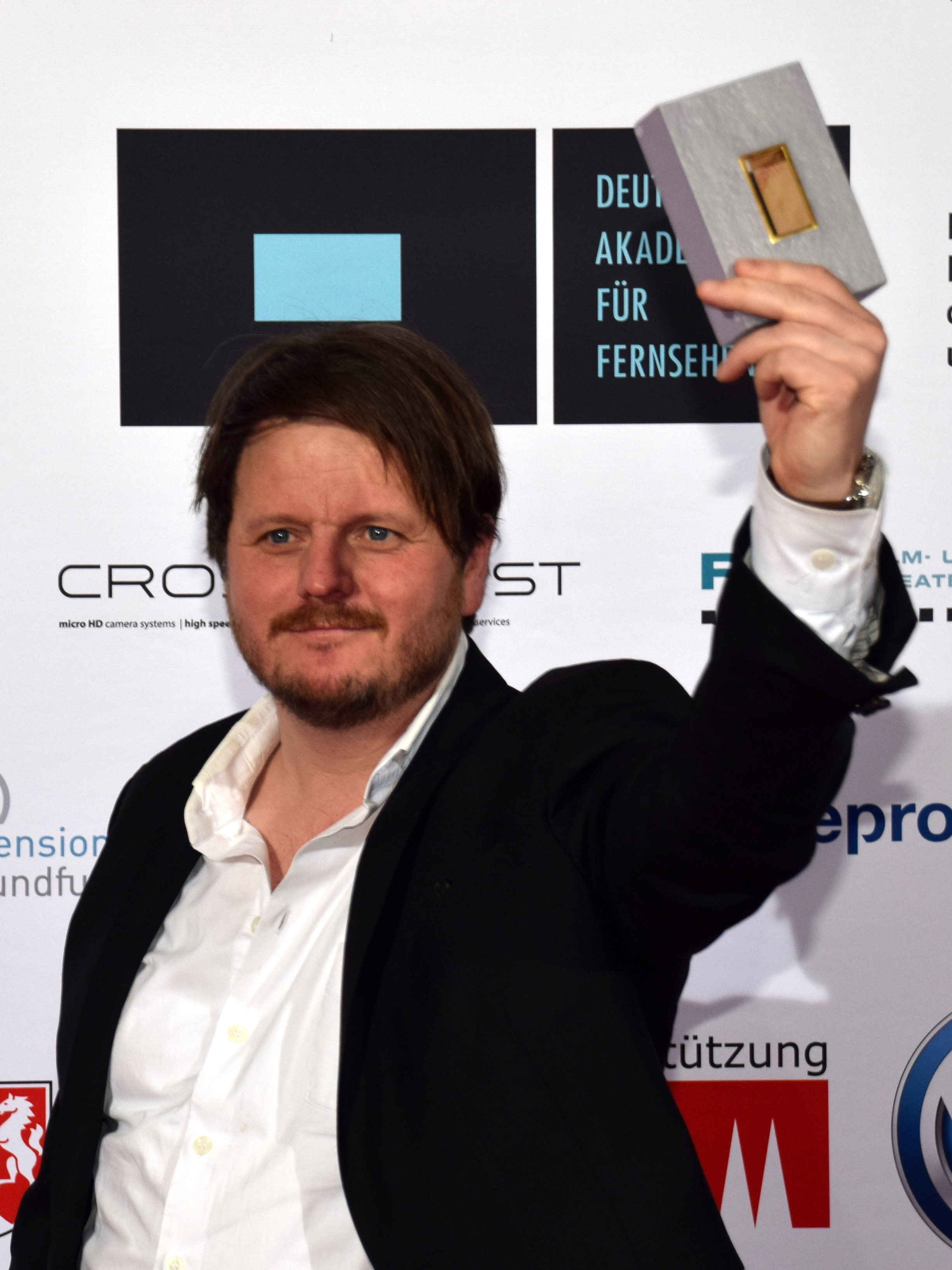 Lutz Heineking Jr. Deutsche Akademie für Fernsehen - Symposium und Preisverleihung 2015 in Köln